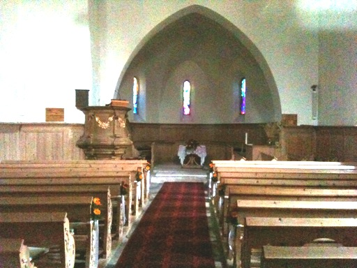 reformierte Kirche Guarda, Kanton Graubünden